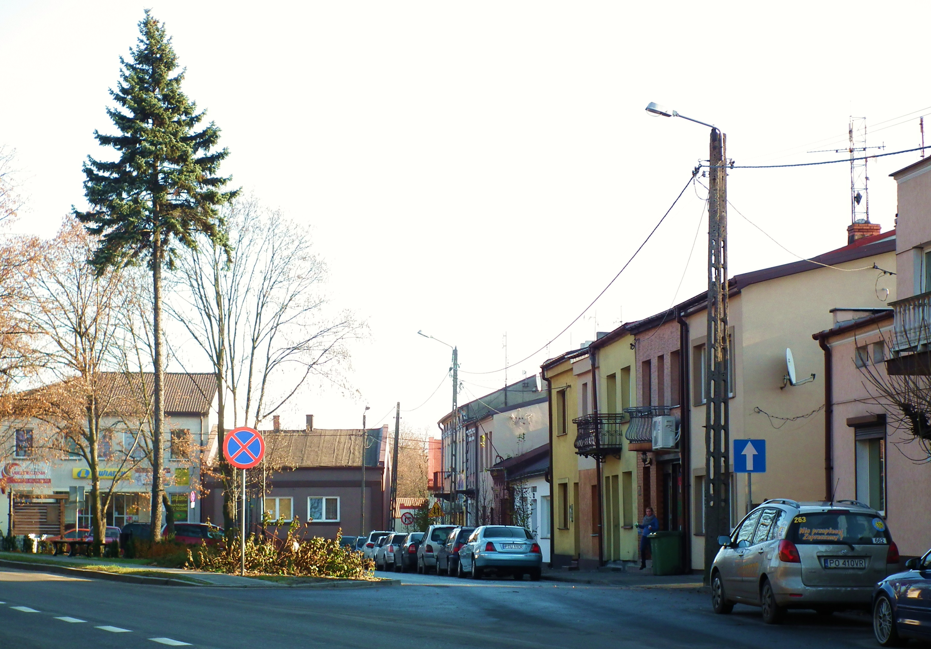 Rynek w Tuliszkowie.